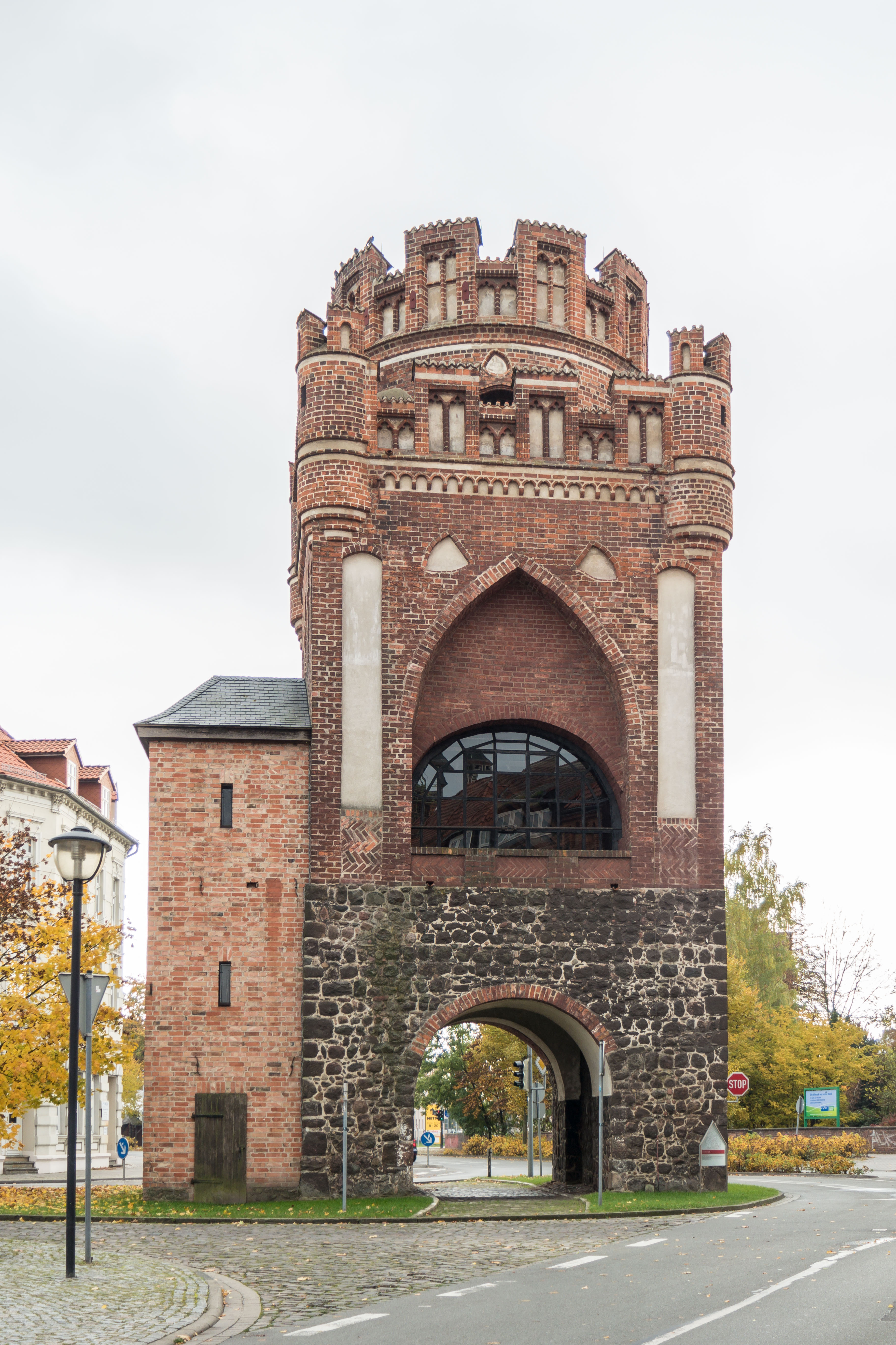 Tangermünder Tor in Stendal. Ansicht Nordseite